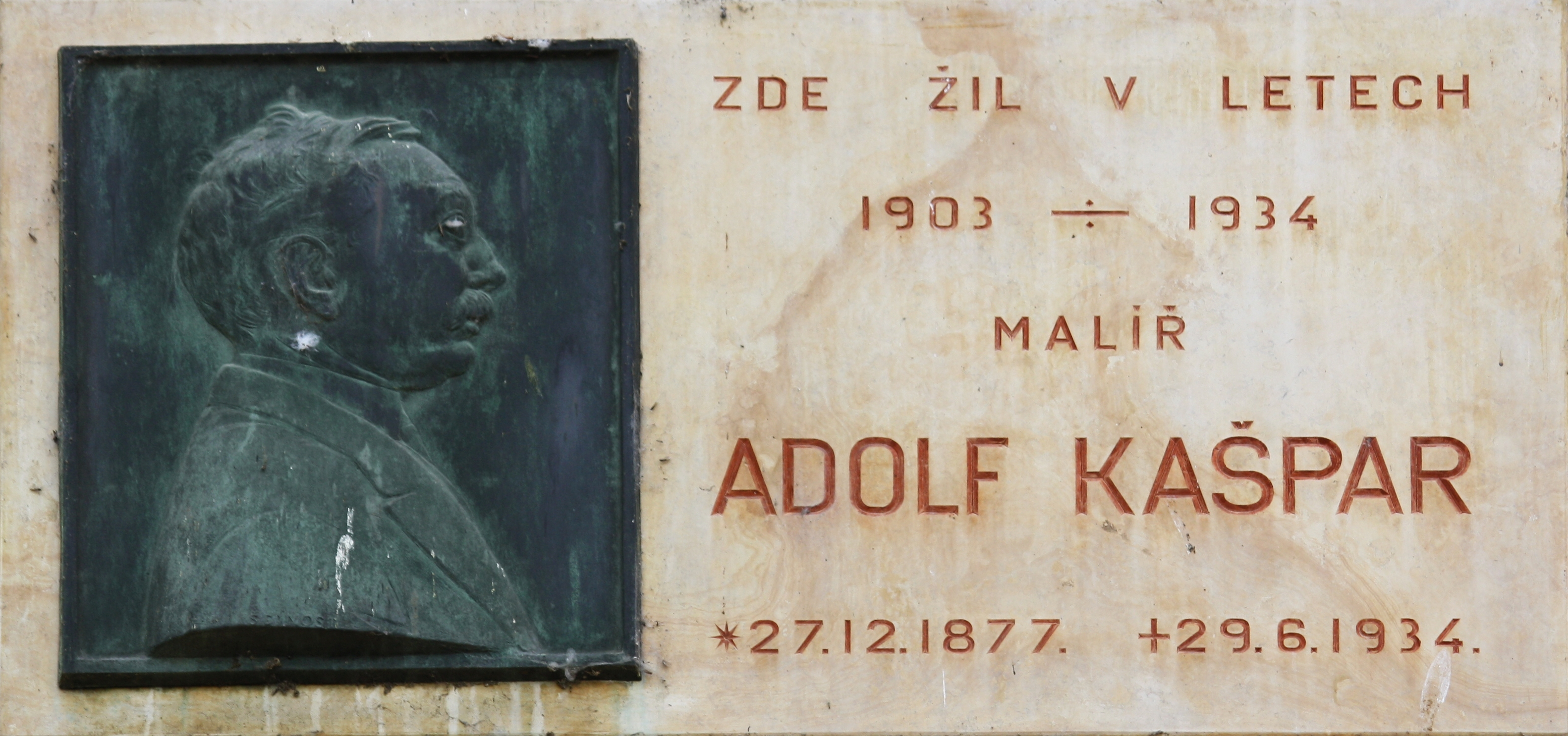 Praha, Malá Strana - Na Kampě 514/9, vltavská strana domu, Adolf Kašpar